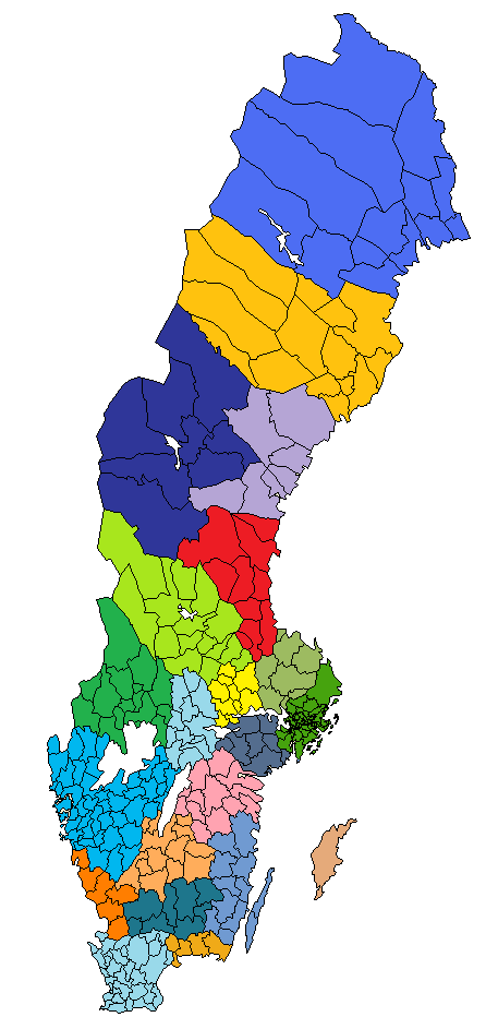 Sveriges län